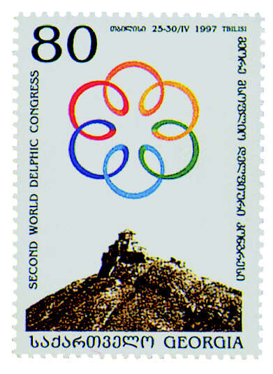 Offizielle Briefmarke zum II Delphische Weltkongress, 1997 Georgien